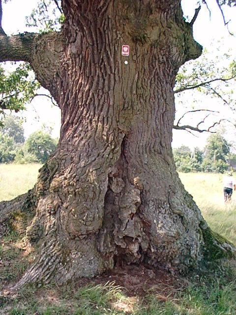 dąb nieopodal wsi Przybudki